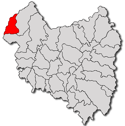 Categorie:Hărţi ale judeţului Covasna